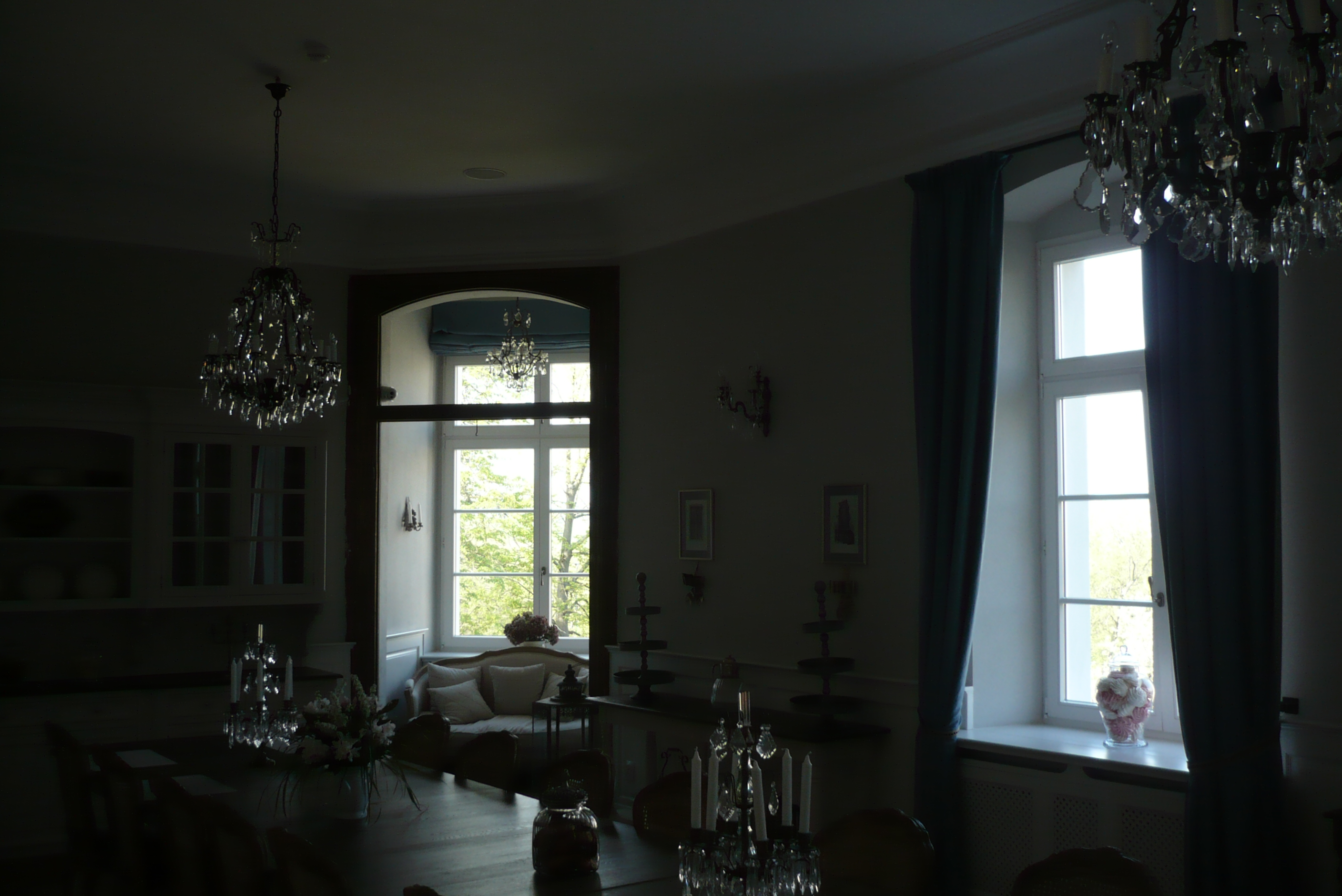 Kamieniec. Sala